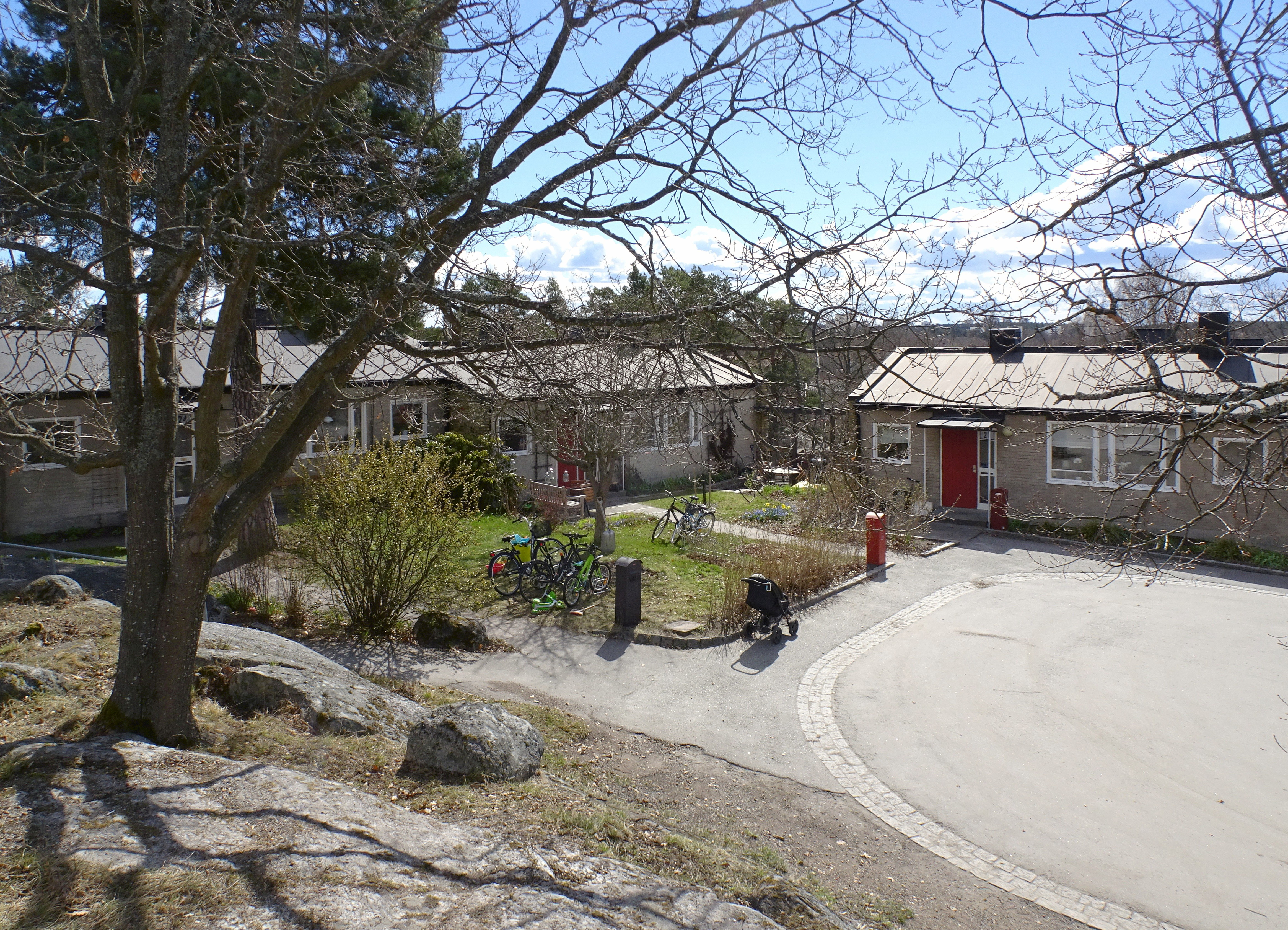 Radhus, Lövångersgatan, Vällingby